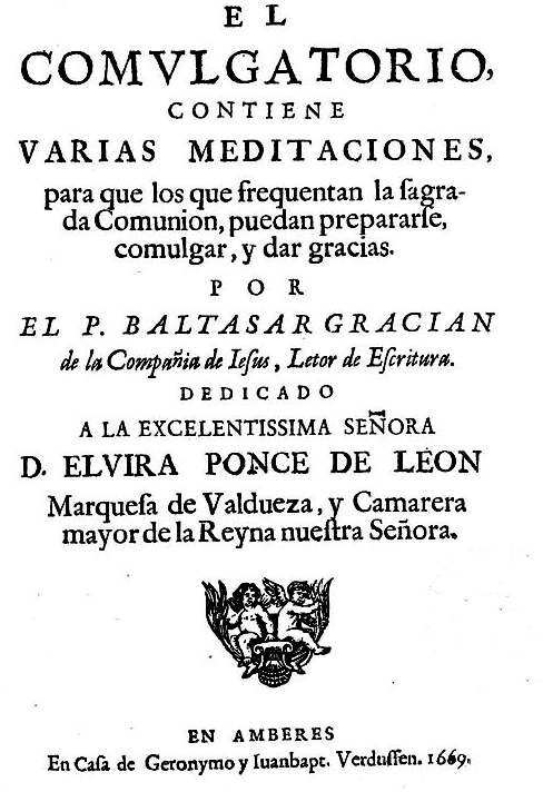 Portada de El Comulgatorio (Baltasar Gracián)